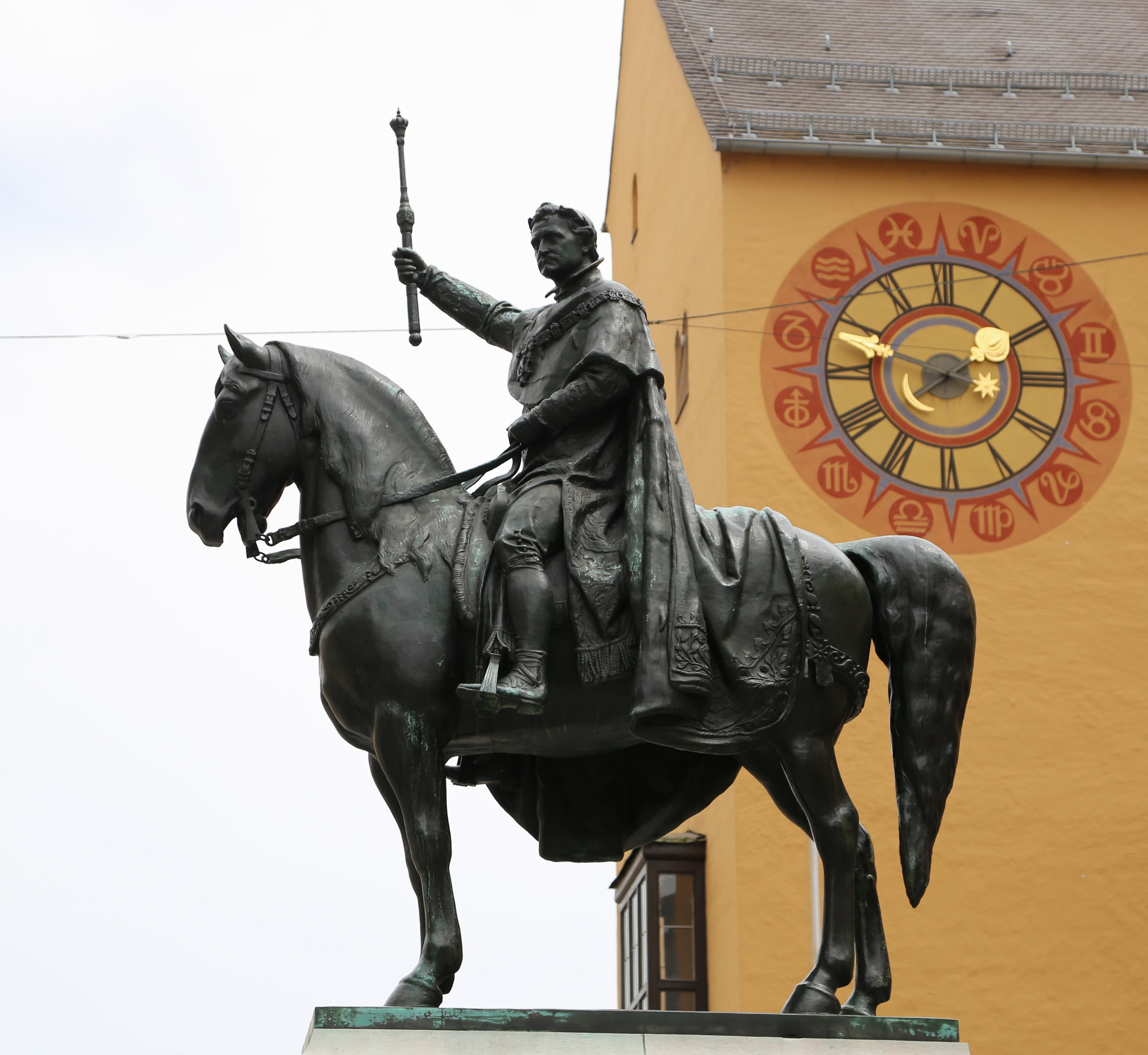 Domplatz; Reiterstandbild für König Ludwig I. von Bayern, Bronzegruppe auf gestuftem Inschriftsockel, historistisch, 1901–02 von Ferdinand von Miller d. J.; bis 1936 auf dem Domplatz aufgestellt, später in den Bahnhofsanlagen wiedererrichtet, 2008–10 Restaurierung und Wiederaufstellung am alten Standort